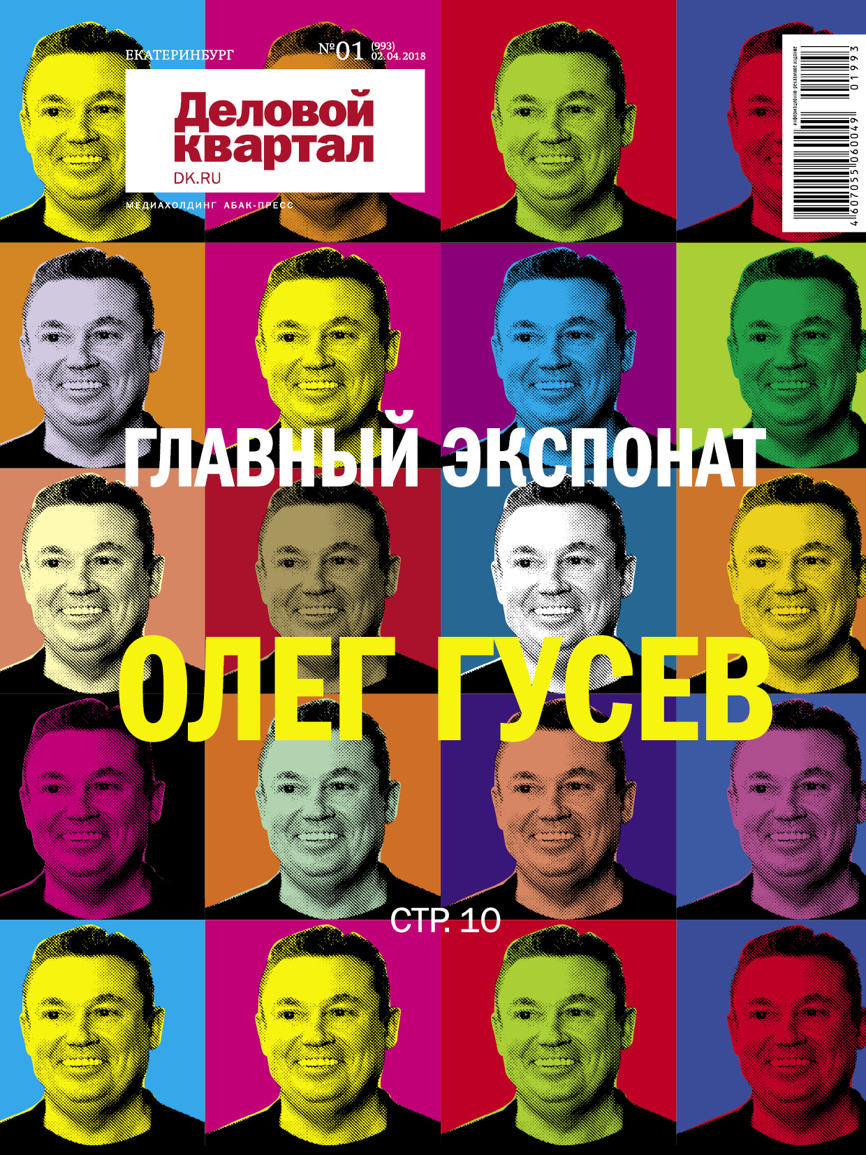 Олег Гусев - Президент Уральского финансового холдинга на обложке журнала «Деловой квартал», №1 (993) от 02.04.2018, г. Екатеринбург